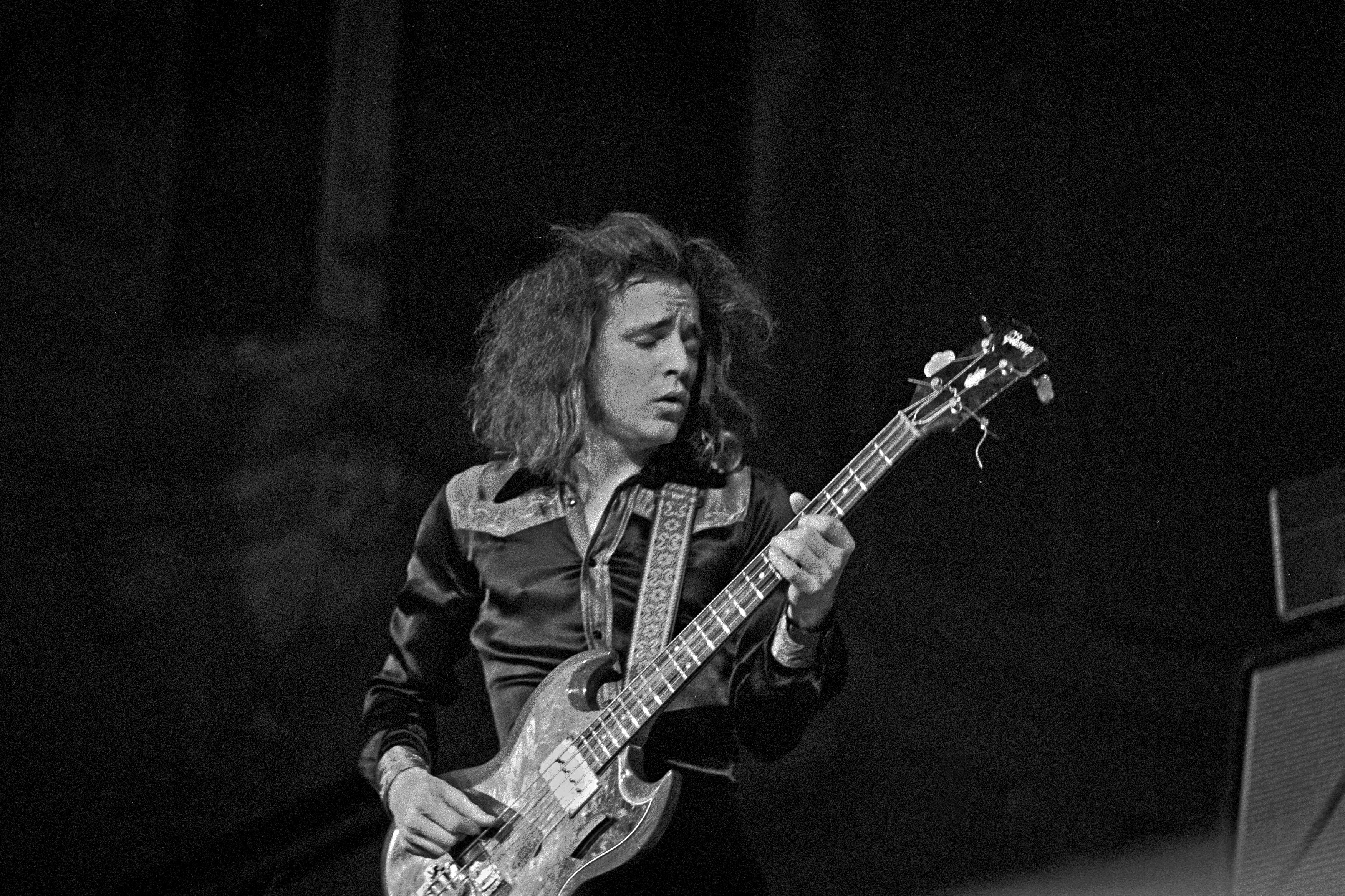 Ex-Cream-Basssist und Sänger Jack Bruce in der Musikhalle Hamburg, Januar 1972 Copyright: Heinrich Klaffs Artikel unter